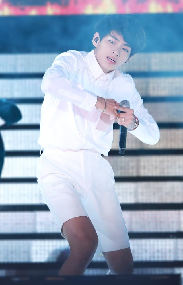 V (Kim Tae-hyung) at Dream Concert on May 23, 2015.